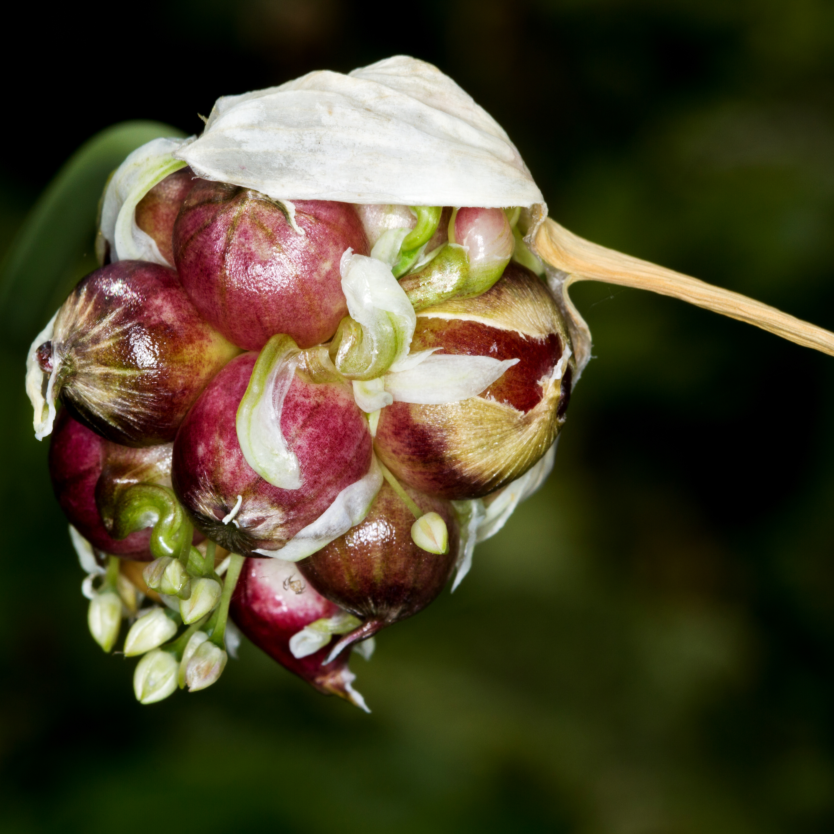 Sachsen, Garten: Knoblauch Brutzwiebeln